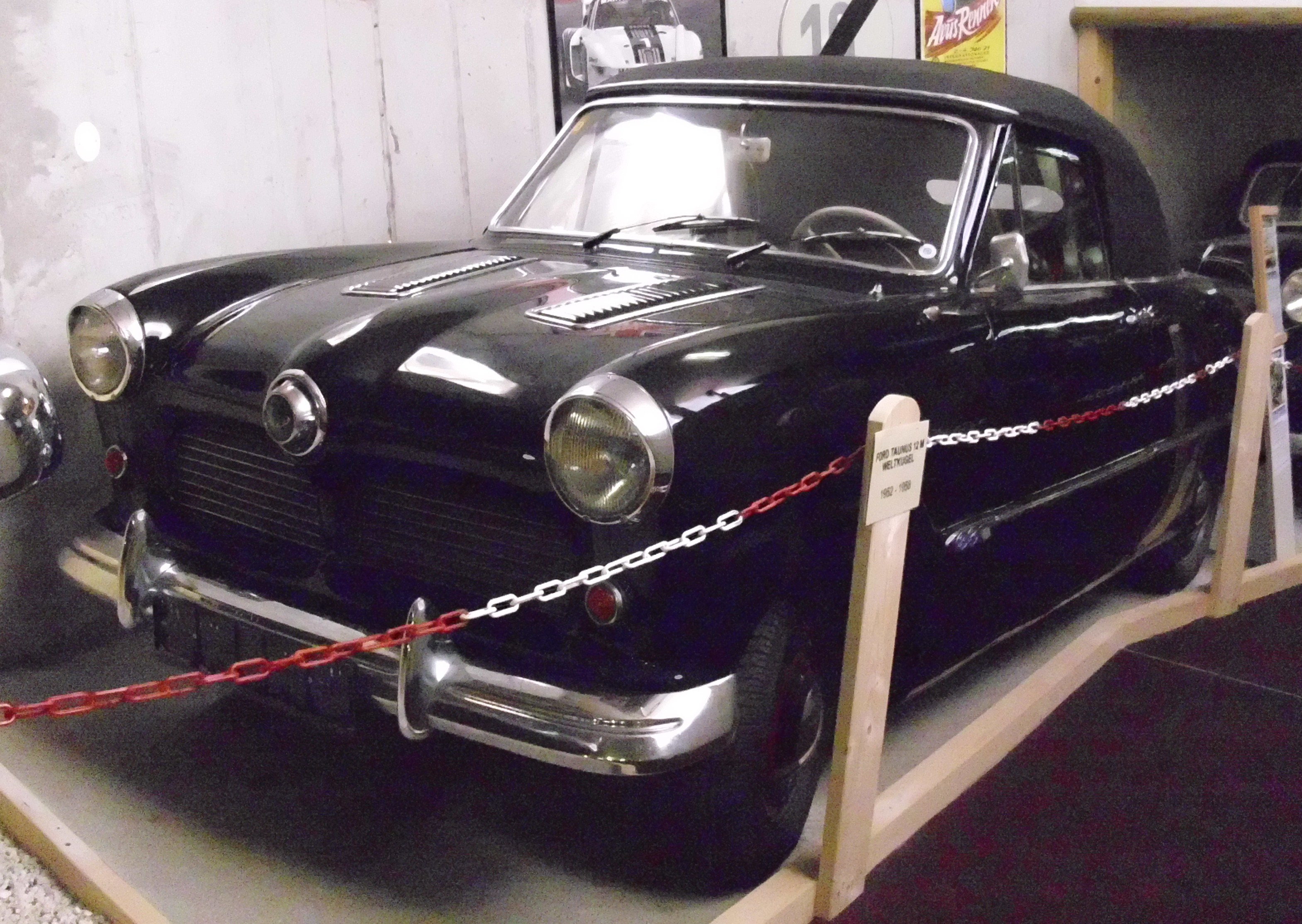 Ford Taunus 12 M 1952–1958 Cabrio im Vötters Fahrzeugmuseum in Kaprun